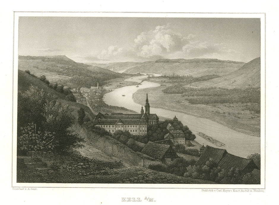 Zell am Main. Stahlstich nach Vorzeichnung von Fritz Bamberger, 1847, aus: Ludwig Braunfels; Die Mainufer und ihre nächsten Umgebungen. Verlag Carl Etlinger, Würzburg 1847. Gedruckt in der Kunstanstalt von Carl Mayer, Nürnberg.